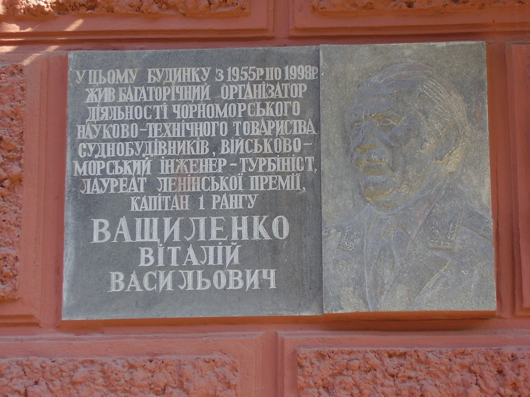 Меморіальна дошка Віталію Васильовичу Ващиленко, організатору Чорноморської науково-технічного товариства суднобудівників. Миколаївська весна у Вікіпедії